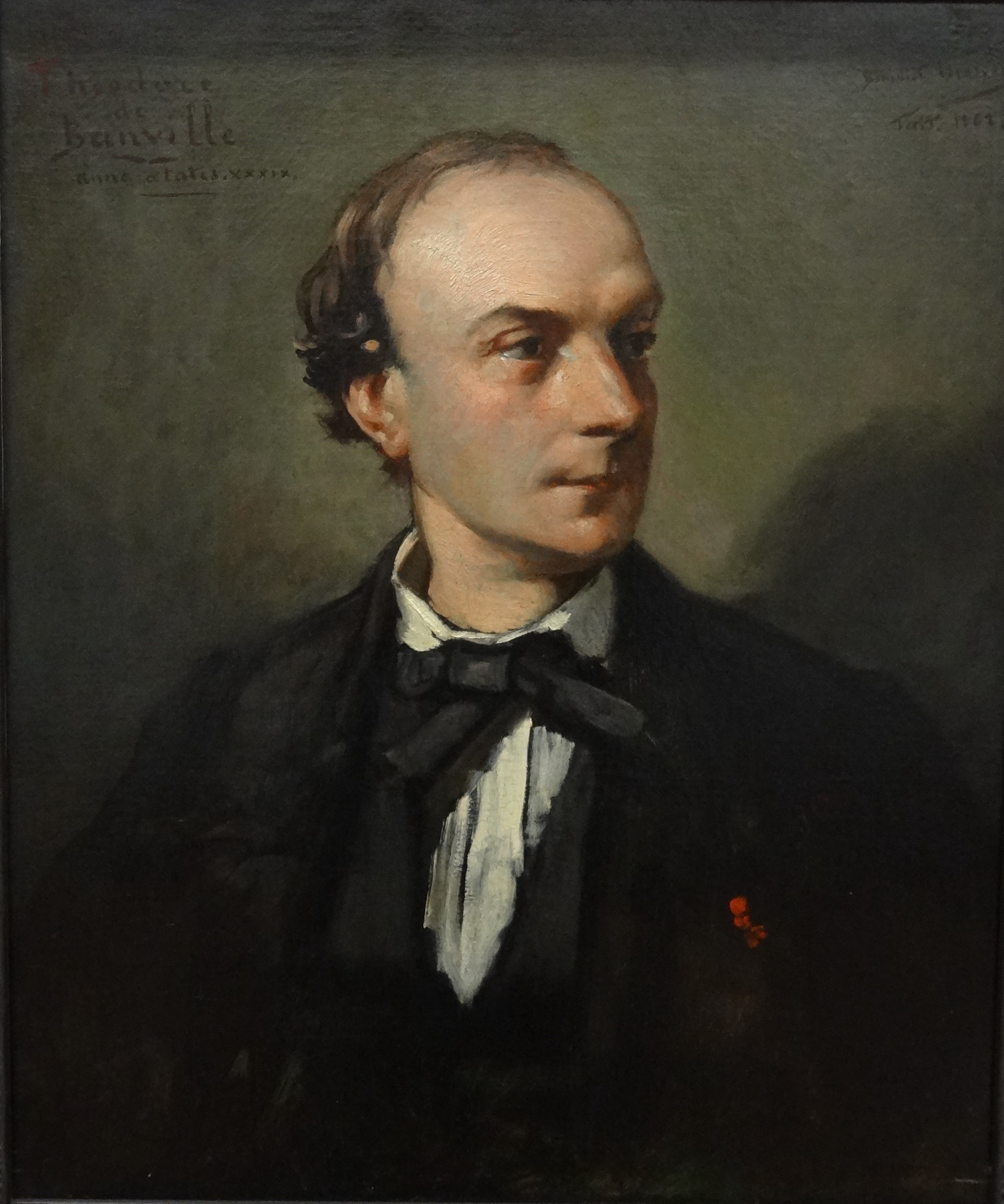 Знаменитый уроженец Мулена, французский поэт и прозаик